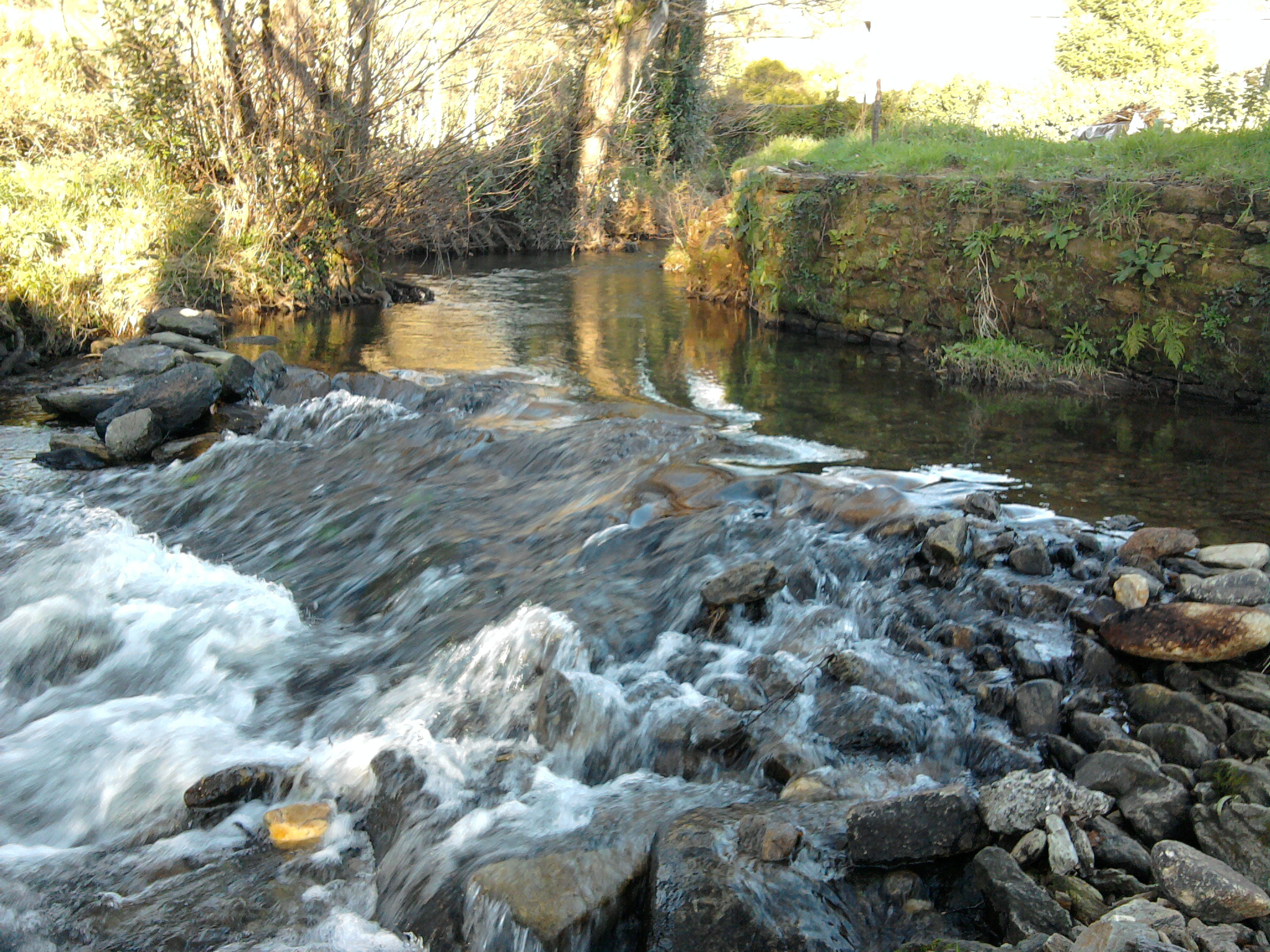 Rio Sarela ao seu paso polo lugar do Romaño, e Santiago de Compostela.